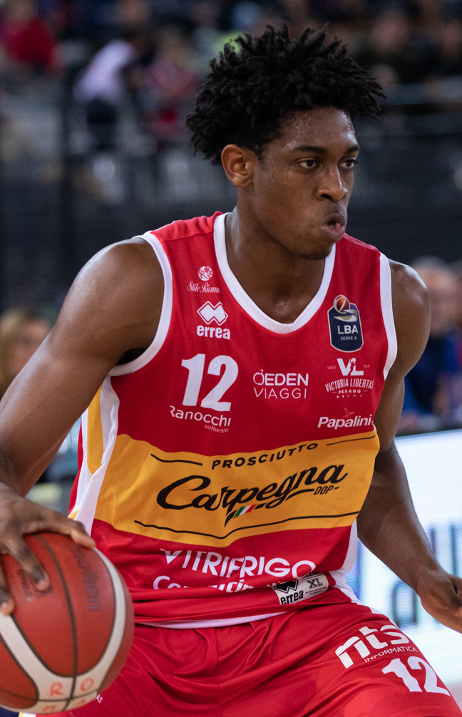 Paul Eboua